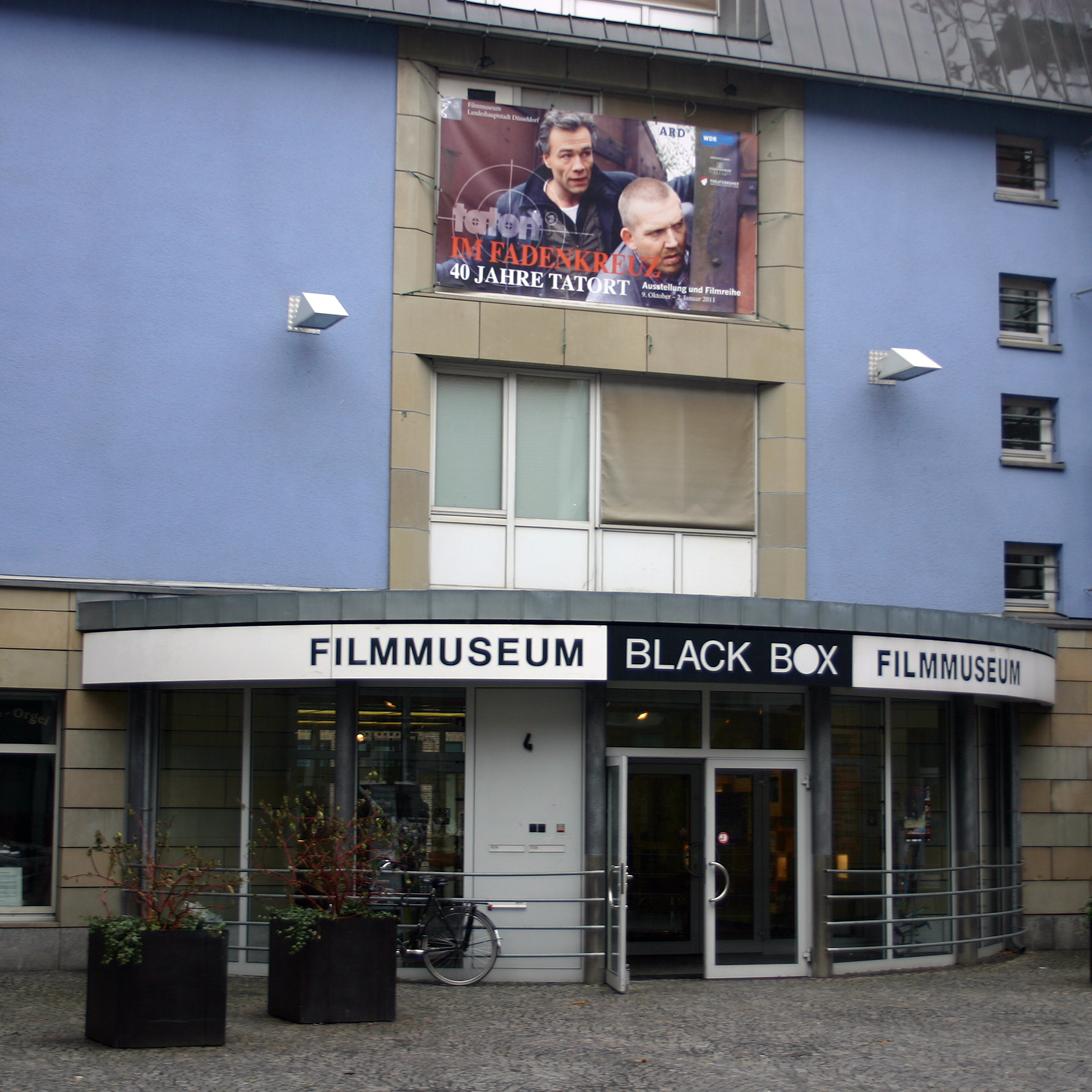 Filmmuseum Landeshauptstadt Düsseldorf. Werbefolie über dem Eingang: „Im Fadenkreuz - 40 Jahre Tatort. Ausstellung und Filmreihe. 9. Oktober - 2. Januar 2011.“ (Part of the original photo; photographed by BlackIceNRW.)